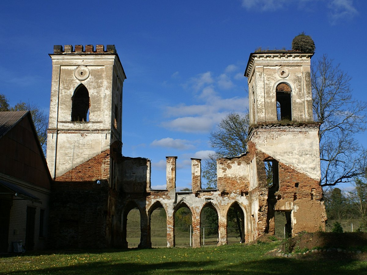 Ruins in Komars' Palace in Palėvenė (Paulianka)